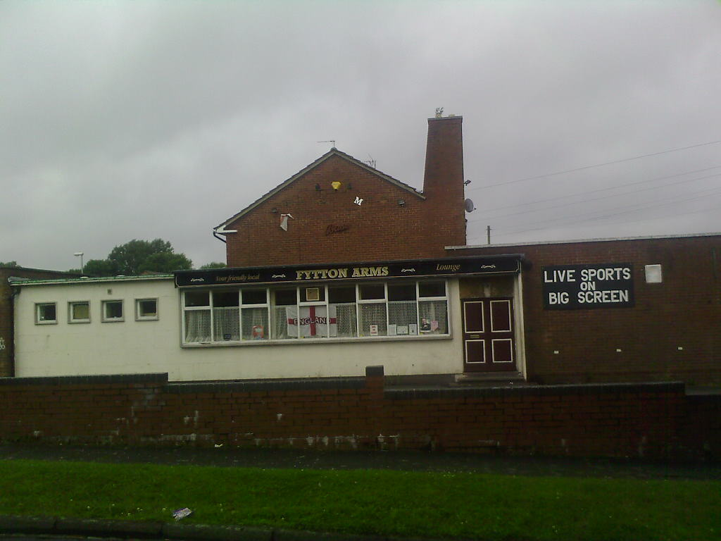 Fytton Arms, Fitton Hill.